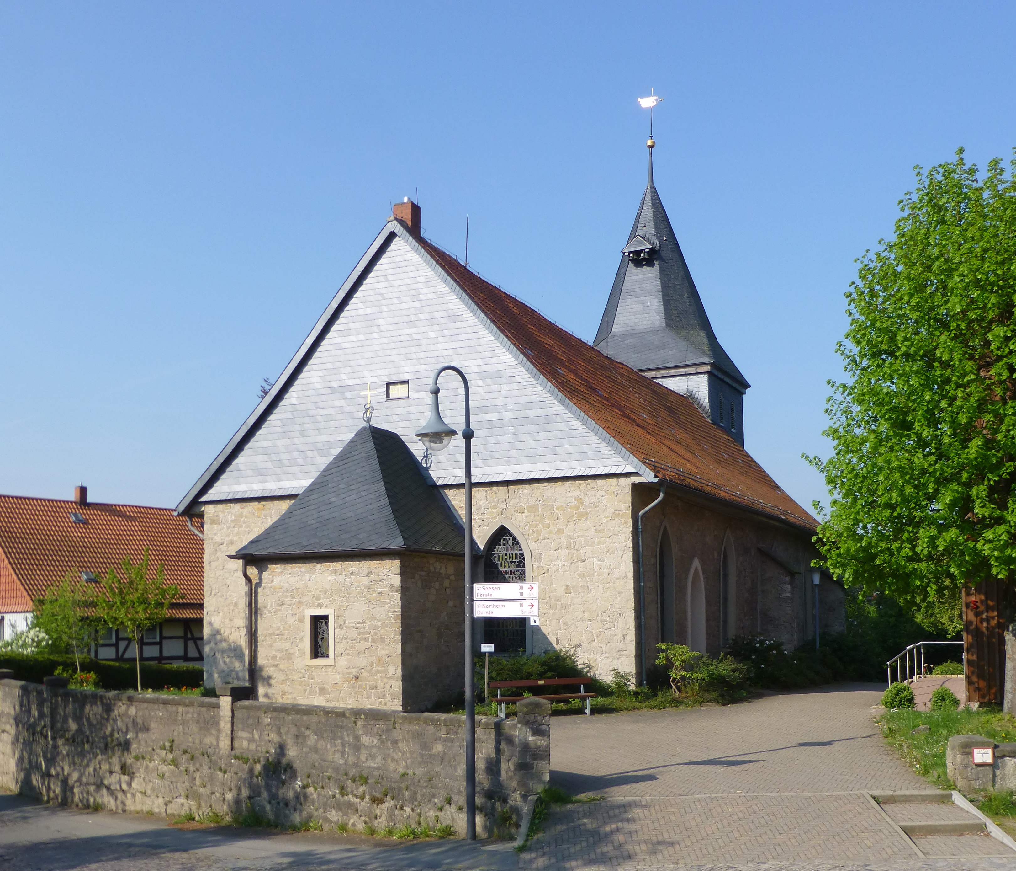 Ev.-luth. Michaelis-Kirche in Schwiegershausen, Stadt Osterode am Harz, Niedersachsen. 1271 ist eine Marien-Kapelle belegt. Offizielle Benennung als "Michaelis-Kirche" seit 1962. Kirchturm-Unterbau errichtet um 1680, Kirchturm-Oberteil erneuert 1763, Kirchenschiff 1800 neu gebaut und 1874 erweitert